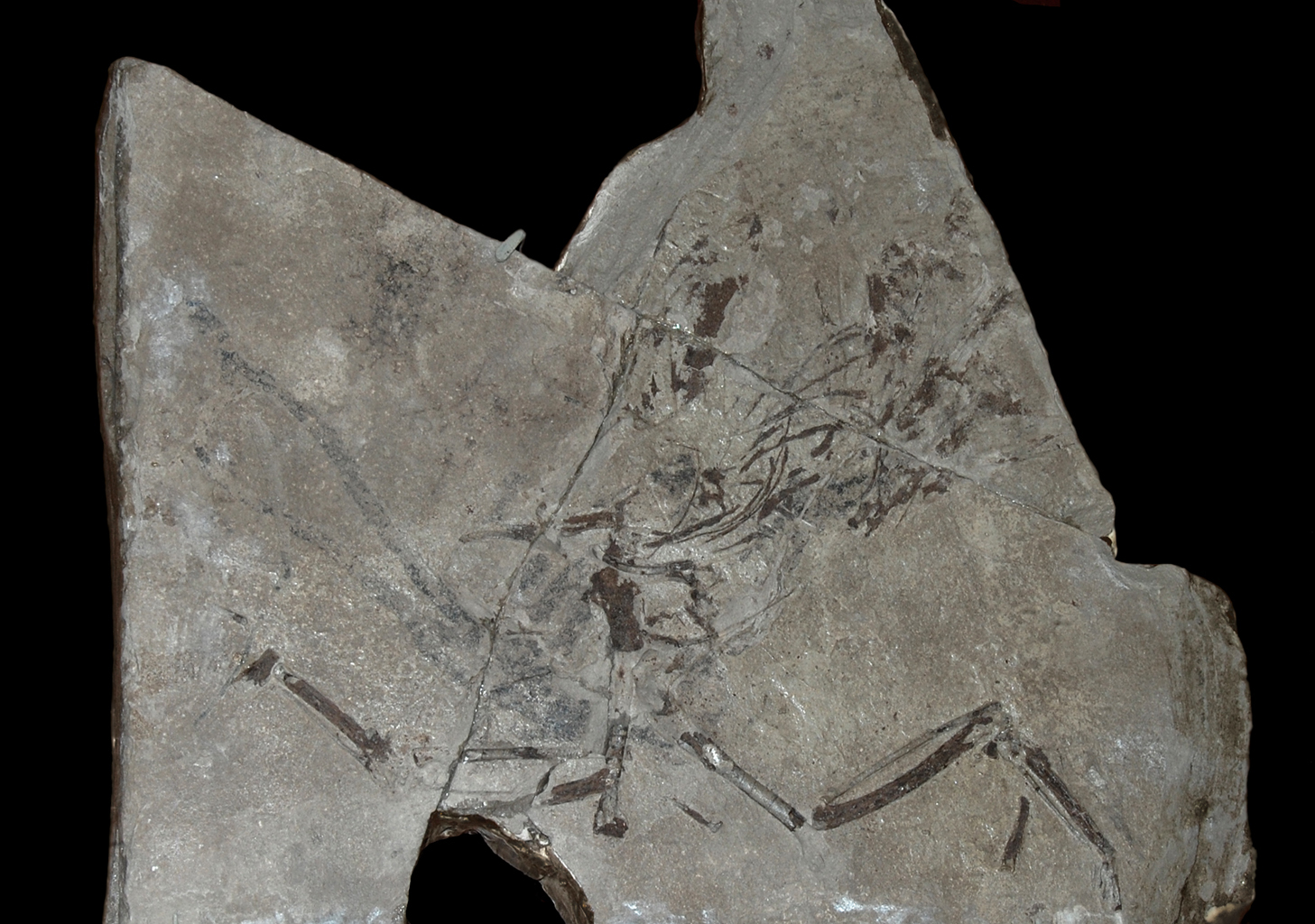 Petralca fossil, Naturhistorisches Museum Wien.